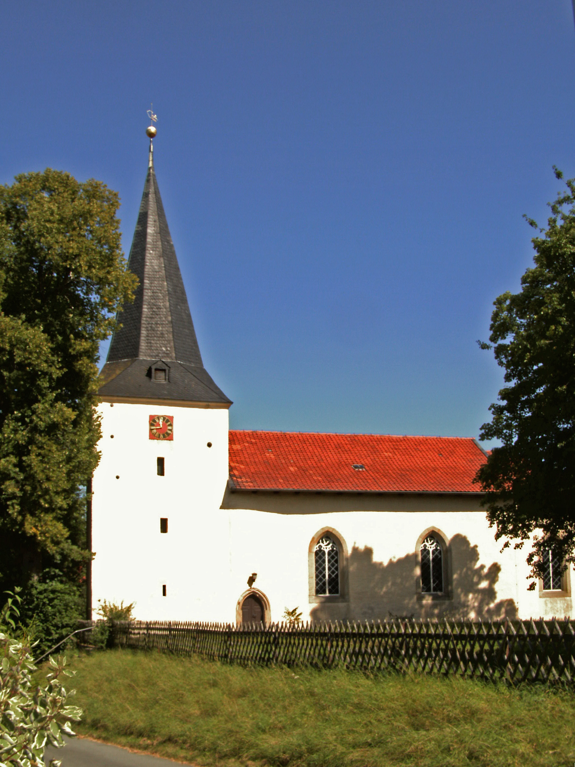 Evangelisch-lutherische Kirche in Ostharingen, Landkreeis Goslar